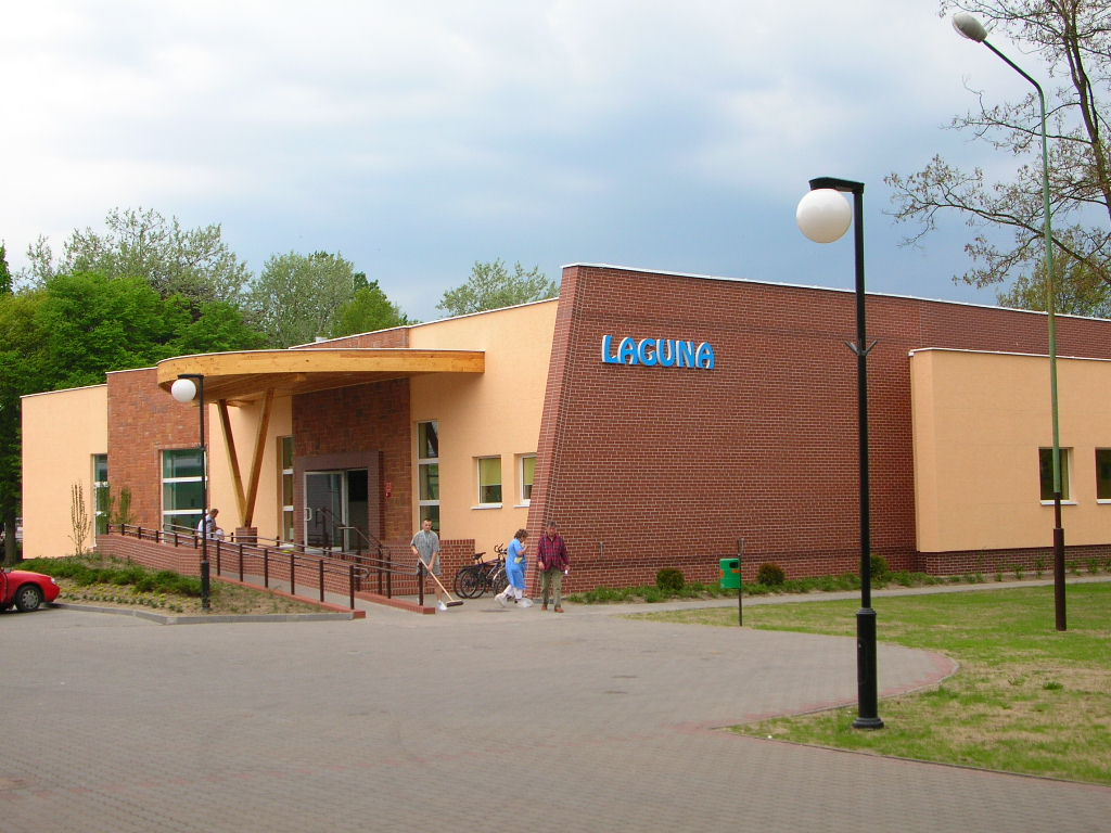 Złotów - Basen Laguna. Autor : Bartek Wawraszko (Bast)